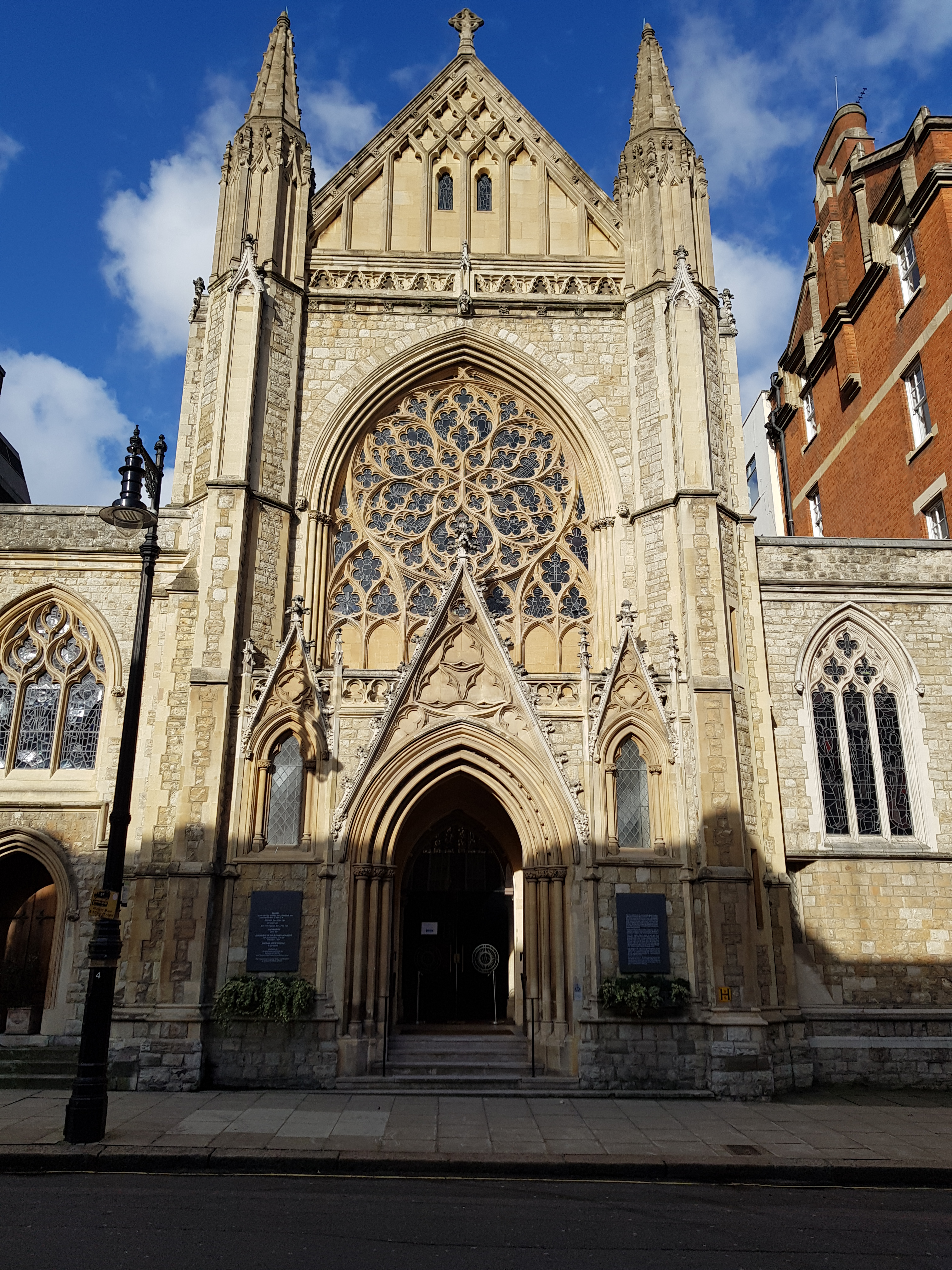 "Farm Street Church", Farm Street, Mayfair, Londres.